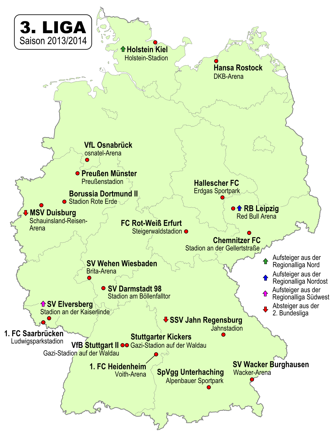 Karte der Vereine der 3. Fussball-Liga 2013/2014